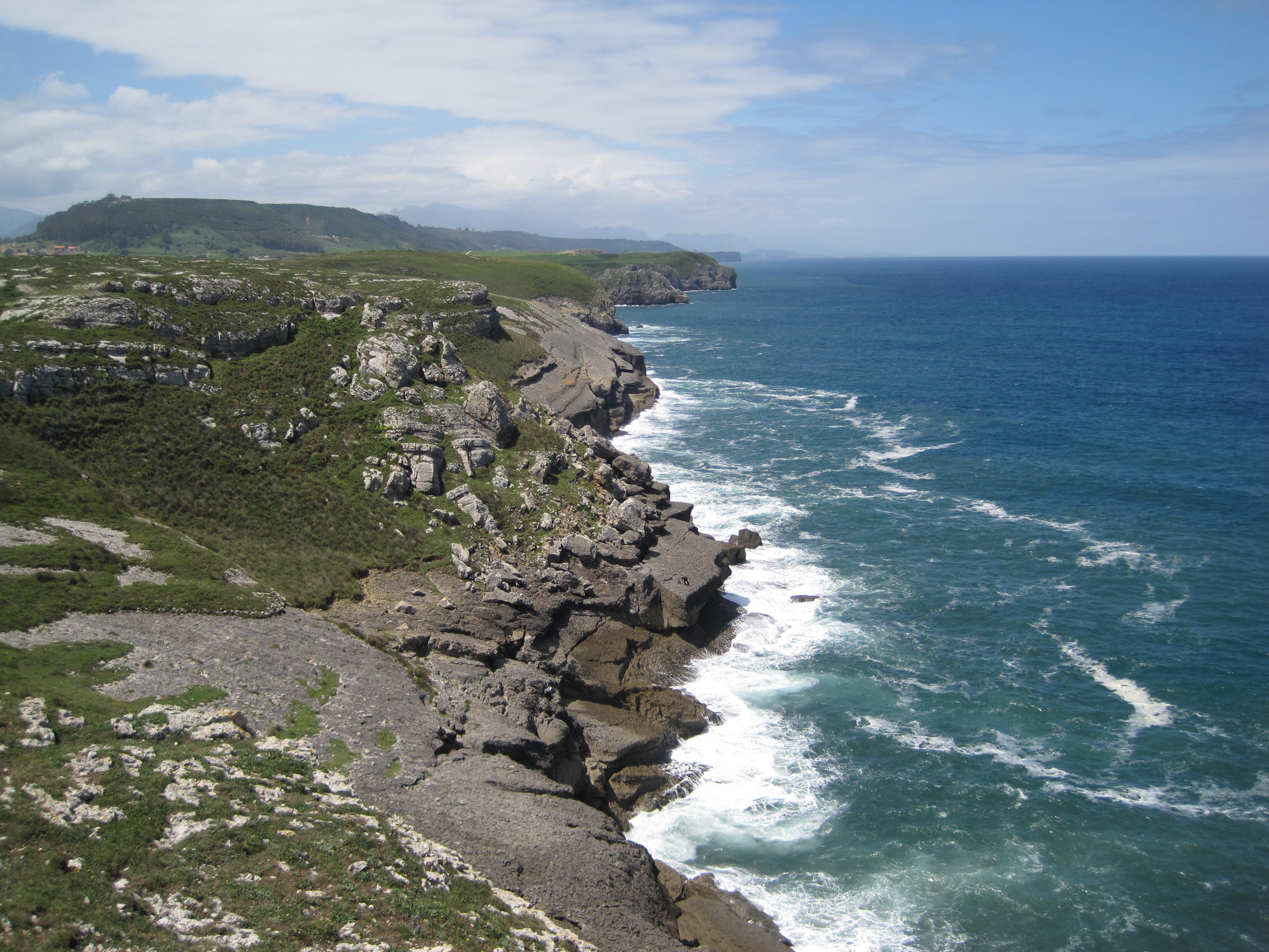 Acantilados en la costa de San Vicente de la Barquera (Cantabria, España) desde el Cueto Marías.